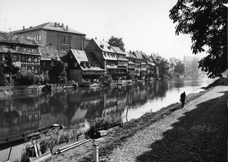 Bamberg (Bayern) Einweihung des Staatshafens von Bamberg Blick auf "Klein Venedig" und Regnitz